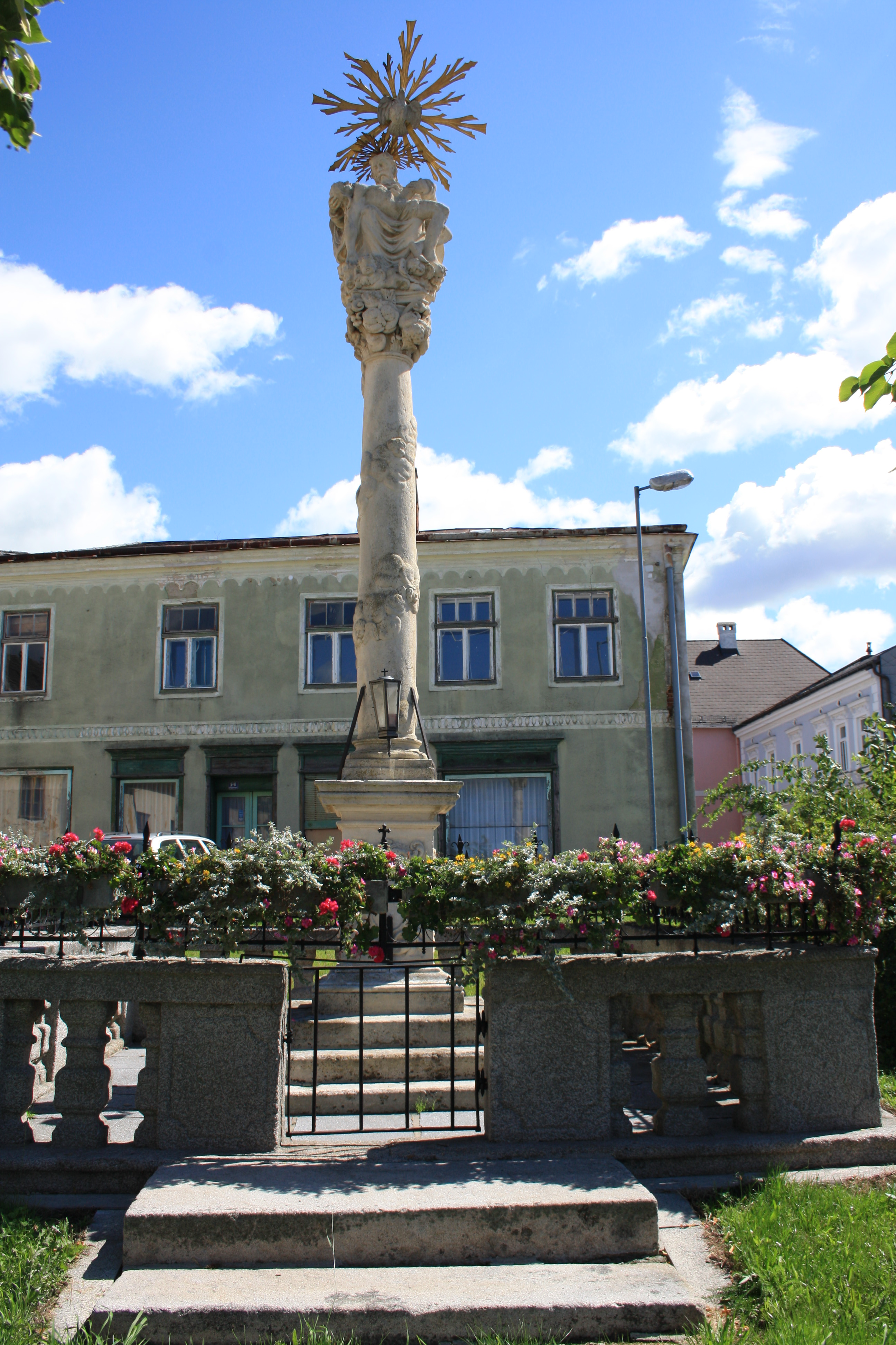 Pest-Dreifaltigkeitssäule in Vitis, Lower Austria